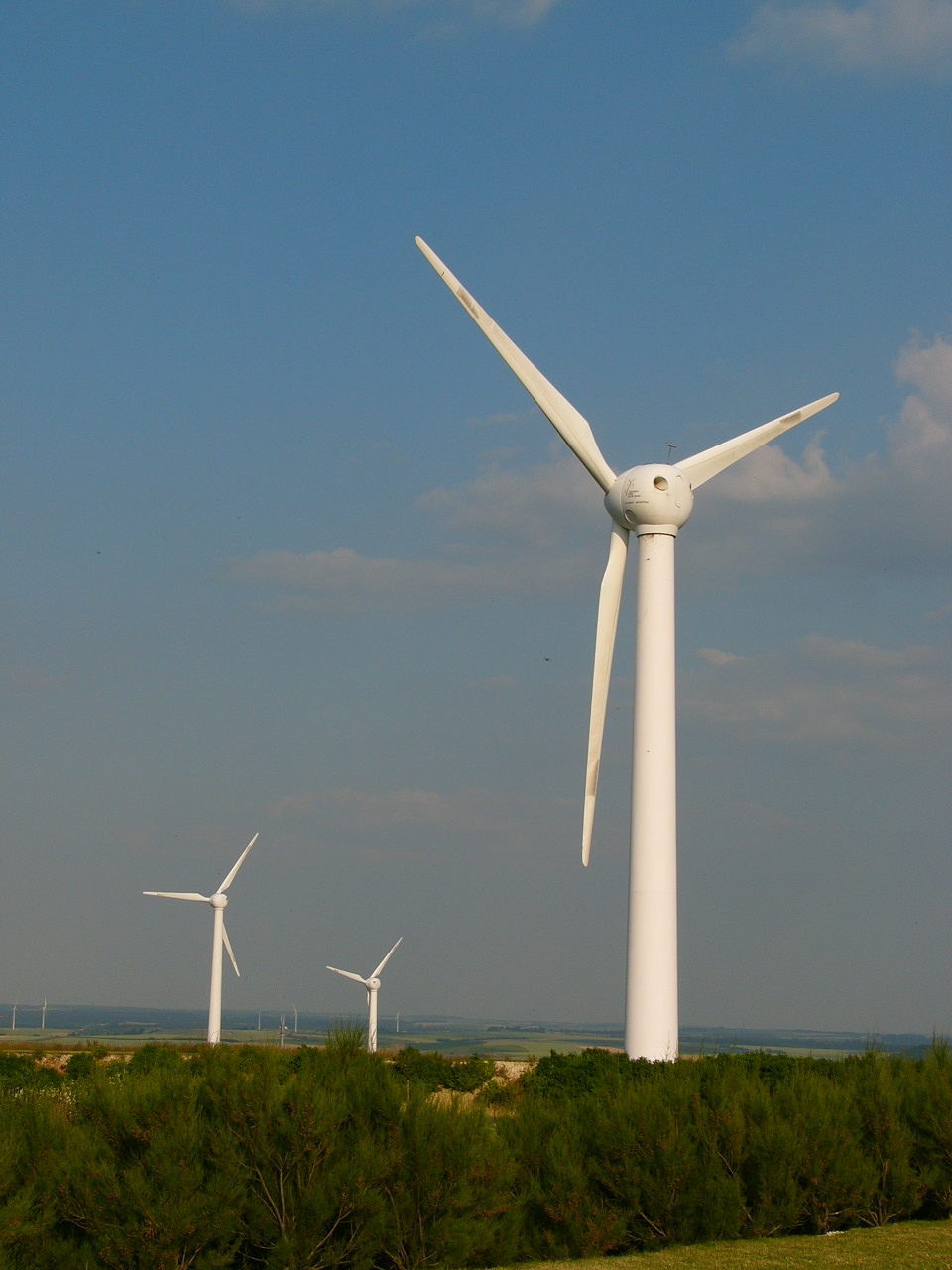 Éoliennes édifiées en 2006 près de Crèvecœur-le-Grand à Hétomesnil (Oise)